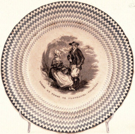 Homme et femme de Ploudaniel entre 1850 et 1895 (faïence de Bordeaux, faïencerie Jules Vieillard et Cie, base Joconde